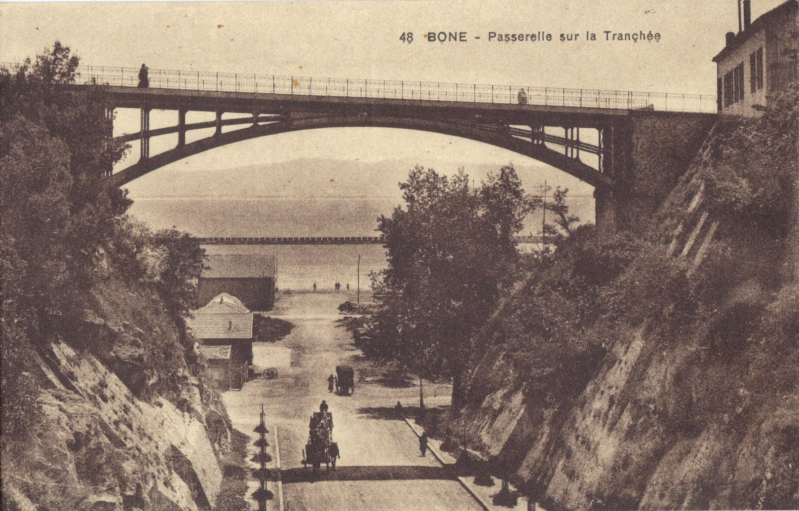 Annaba Bone La passerelle